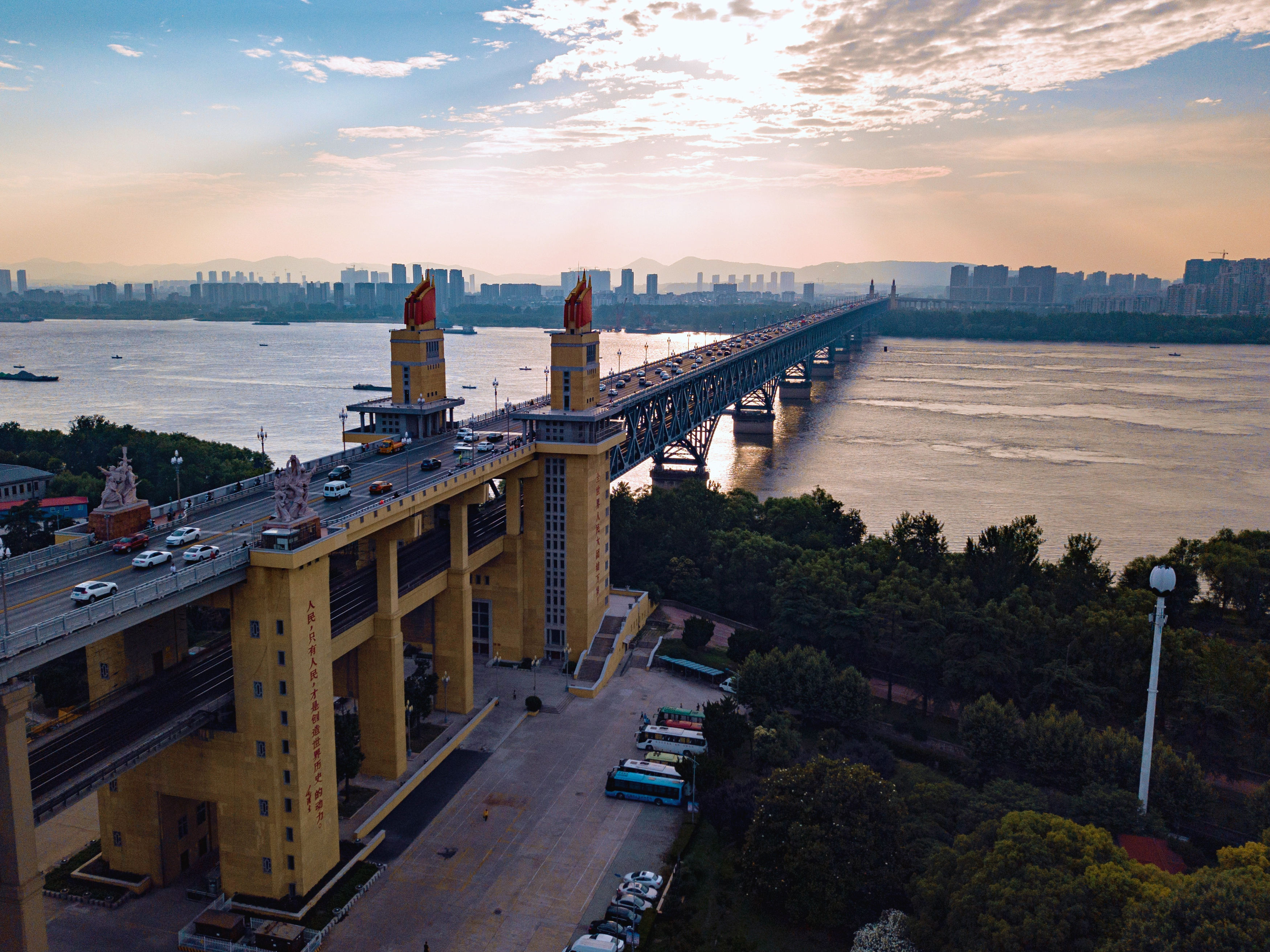 中文（中国大陆）: 南京长江大桥